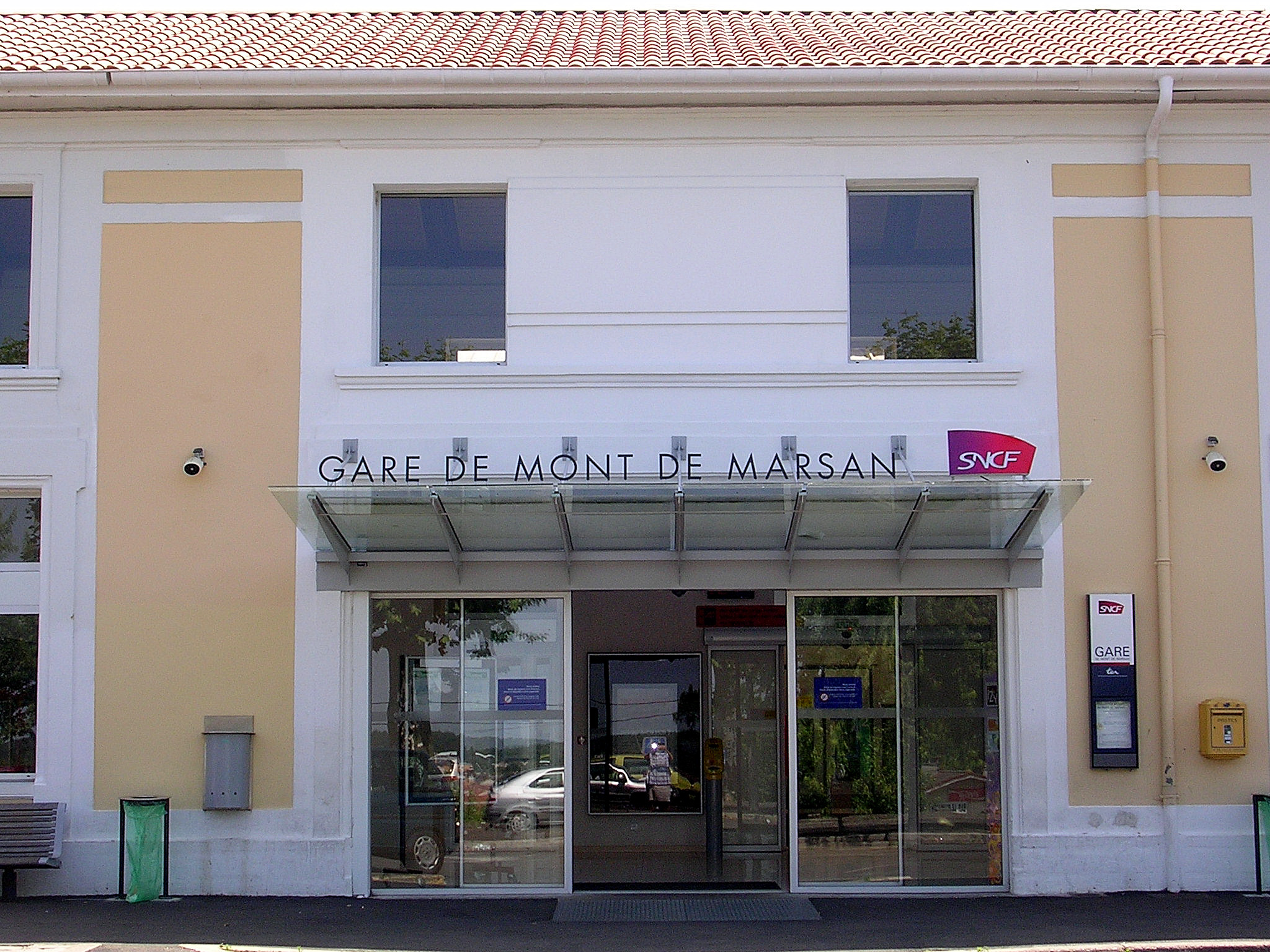 Gare de Mont-de-Marsan, dans les Landes (France)